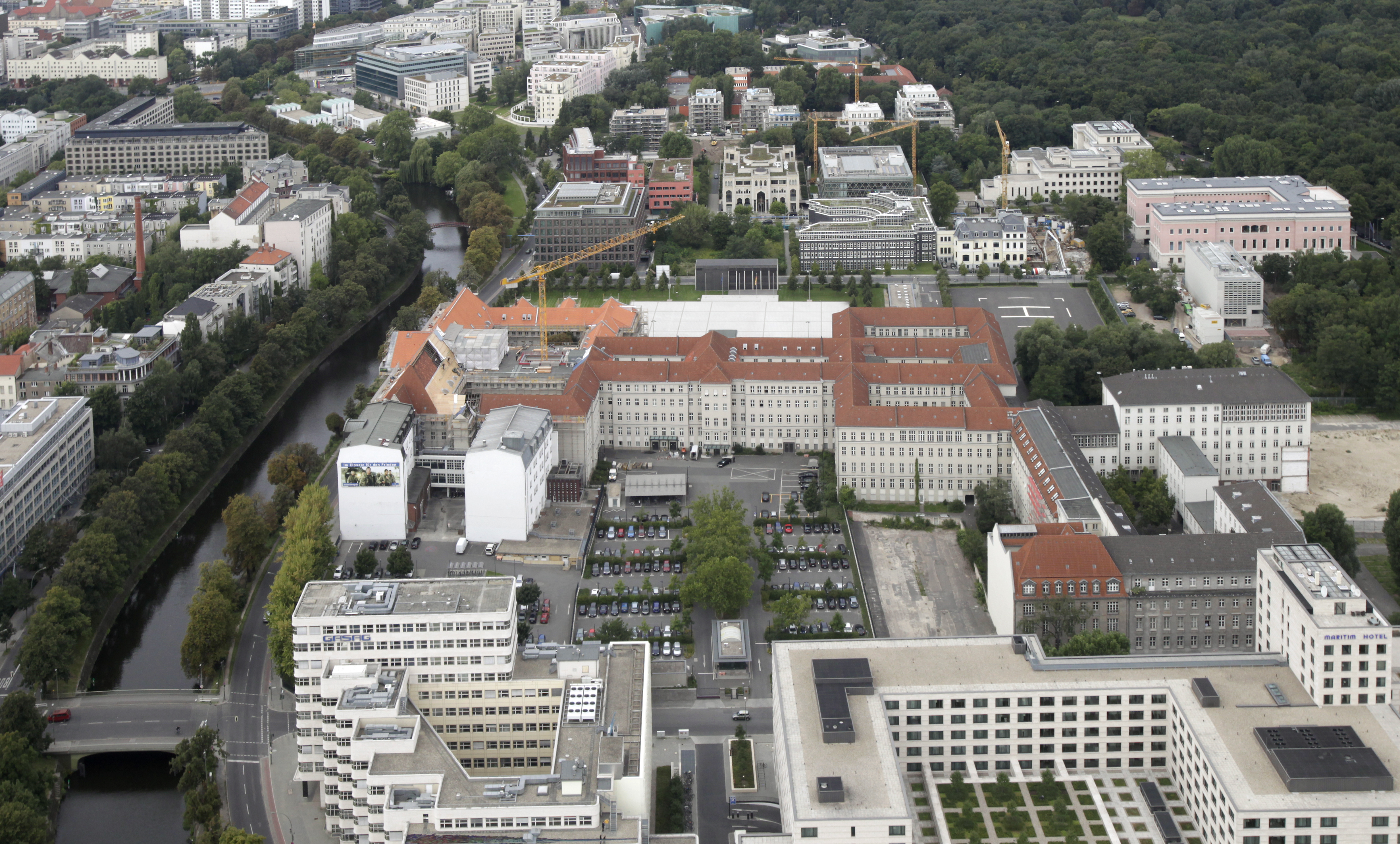 Das Bundesministerium der Verteidigung (2. Dienstsitz in Berlin) mit dem Ehrennmal der Bundeswehr aus der Vogelperspektive. Â©Bundeswehr/Bienert